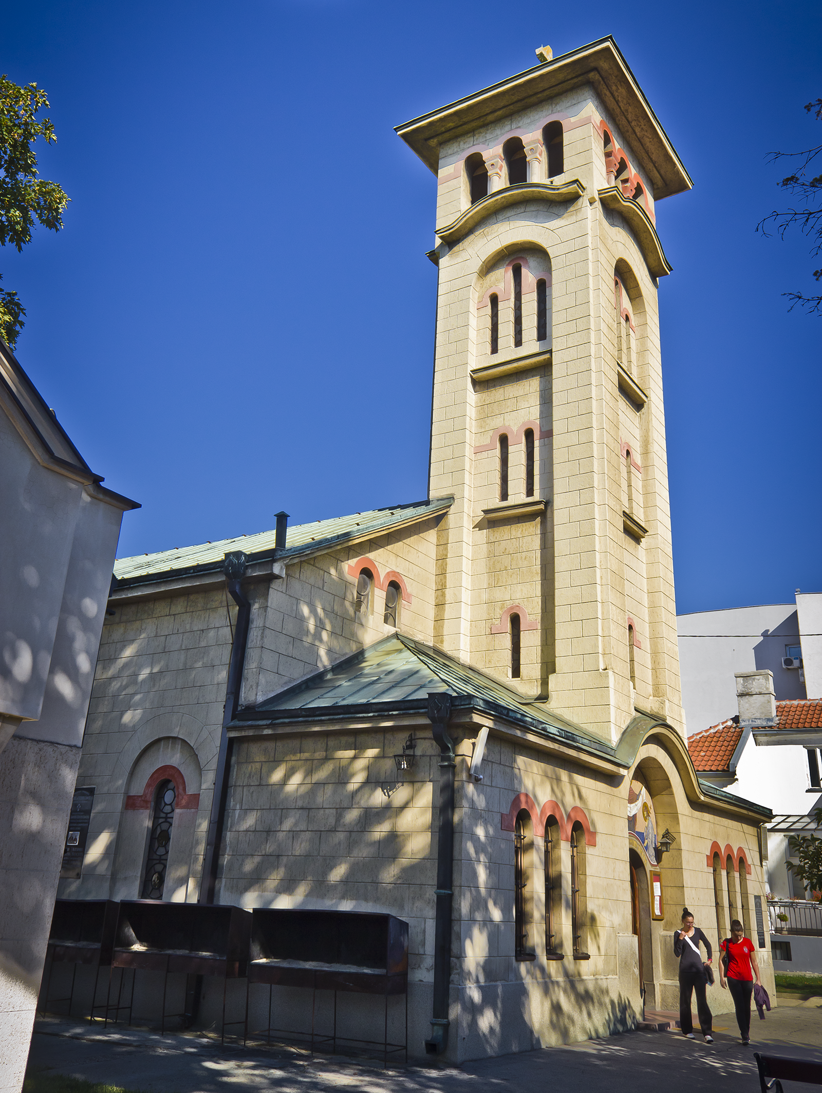 Crkva Pokrova Presvete Bogorodice u Beogradu i devojke.